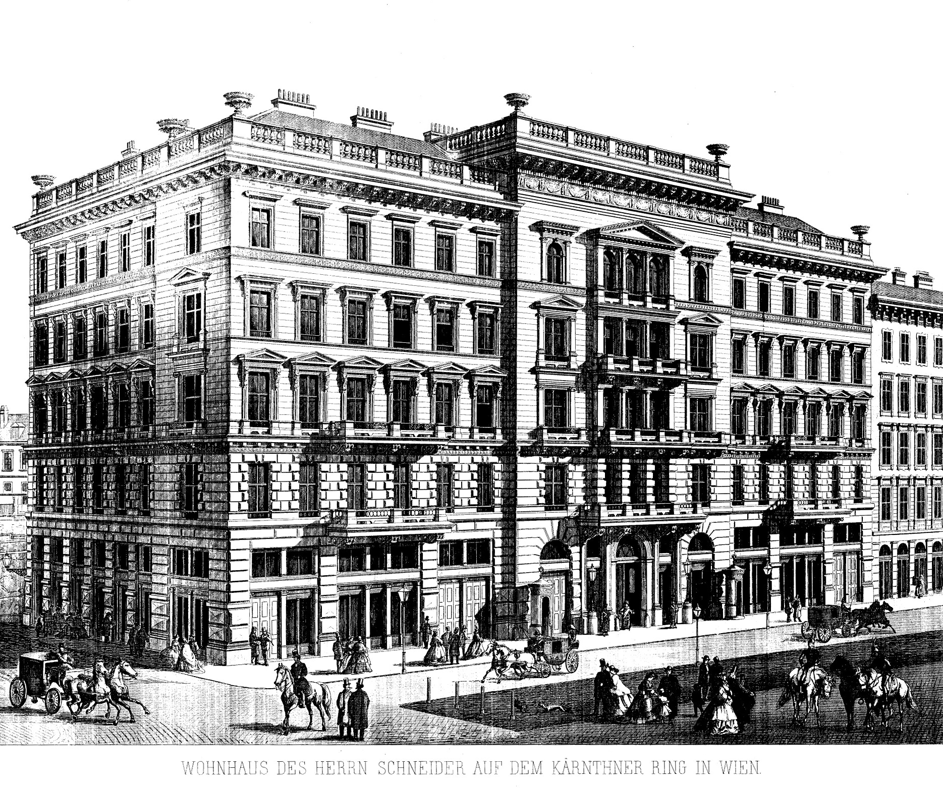 Wien, Innere Stadt, Kärntner Ring 9, Schneider’sches Haus (später Grand Hotel Wien), Architekt Carl Tietz (1831–1874)